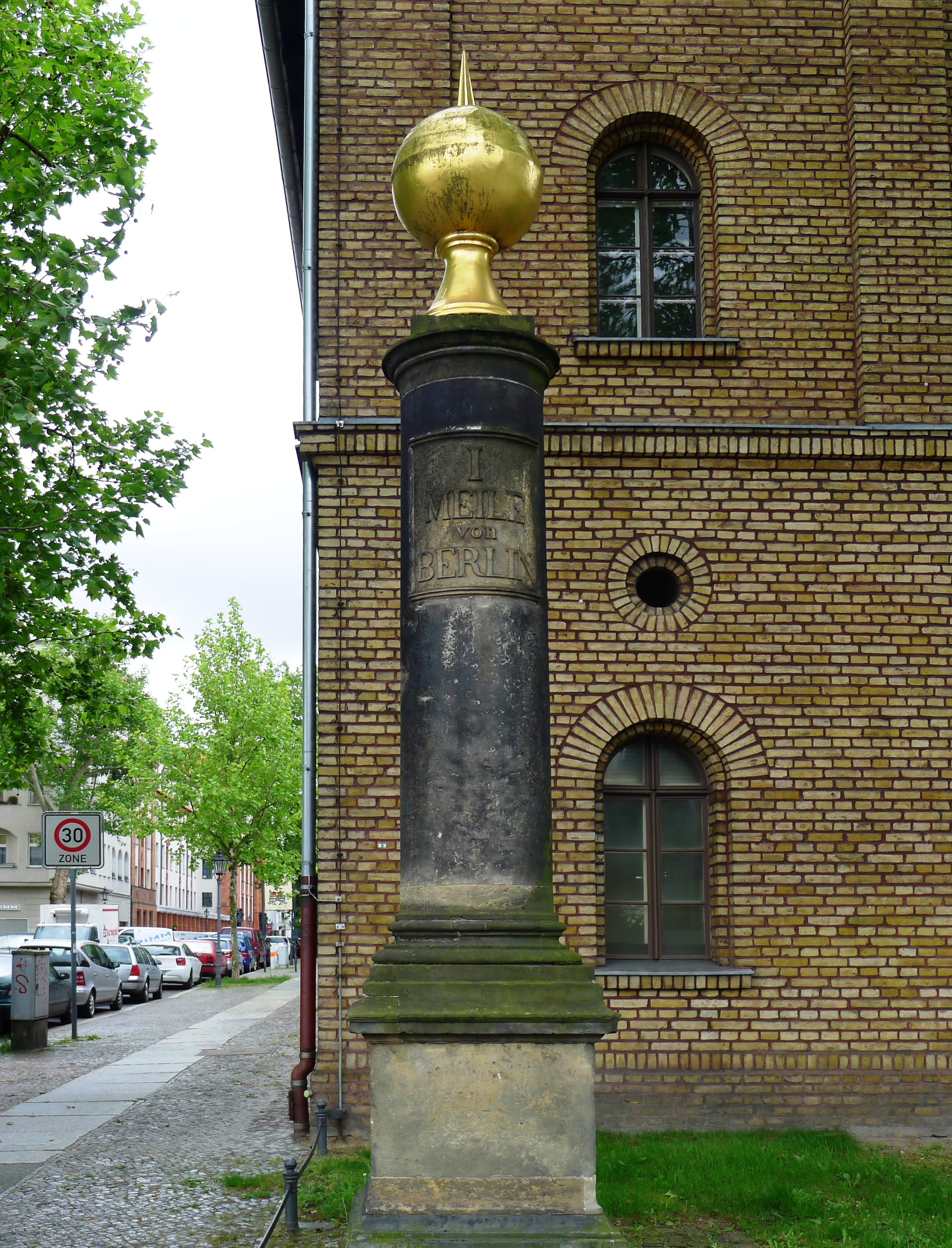 Meilenstein